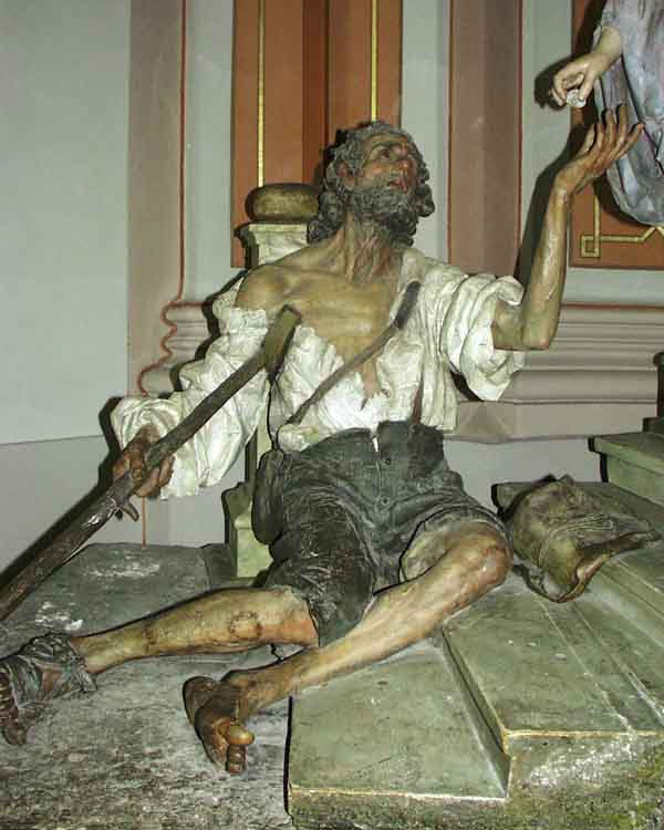 Beggar with group of Saint Elisabeth.Sculpture by Rudolf Moroder- Bettler der Hl. Elisabeth-Gruppe Des Rudolf Moroder in der Pfarrkirche St. Ulrich in Gröden